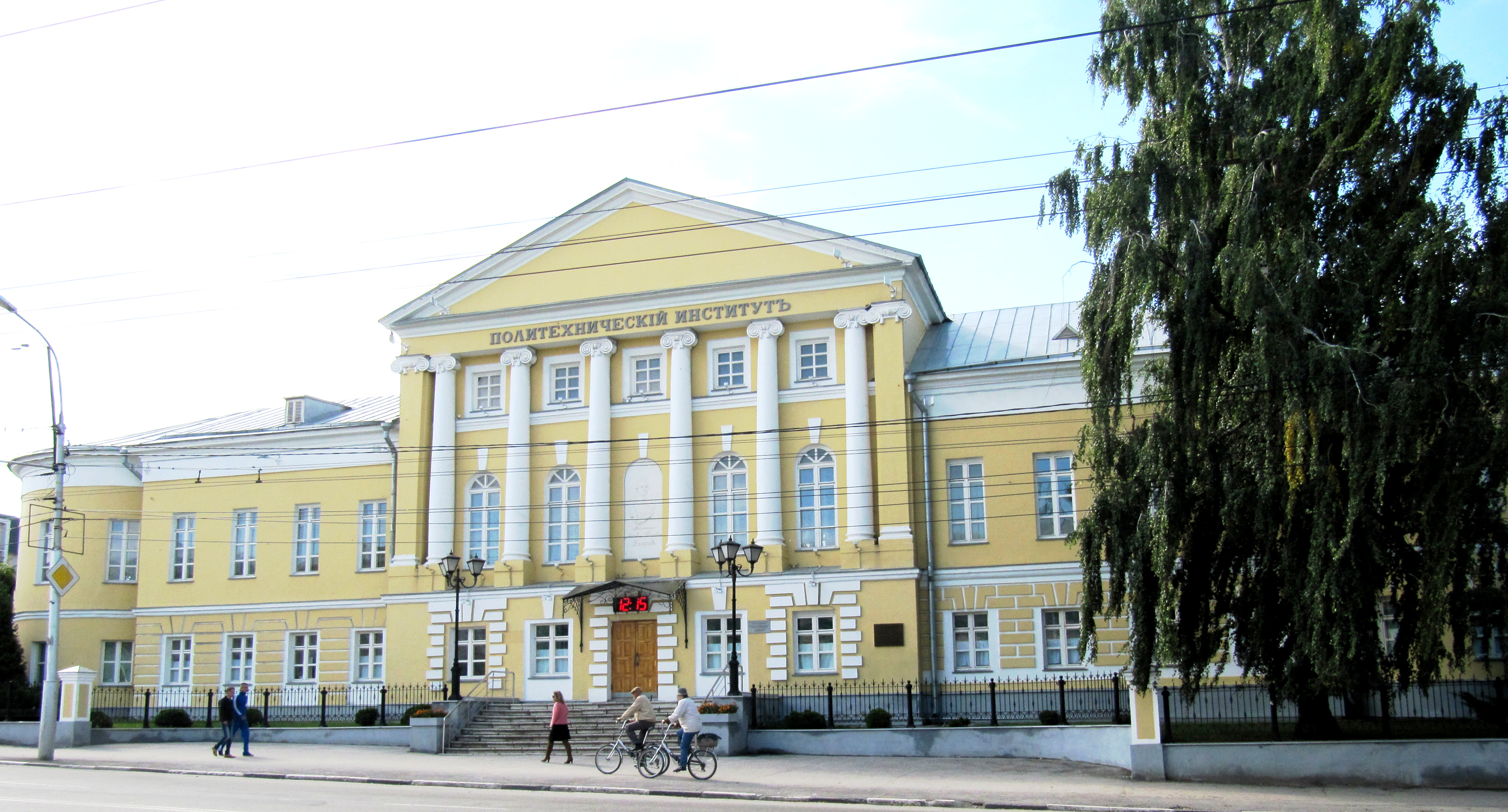 Ансамбль засторойки улицы Ленина (Астраханской) (Рязанская область, Рязань, улица Ленина (Астраханская улица ))